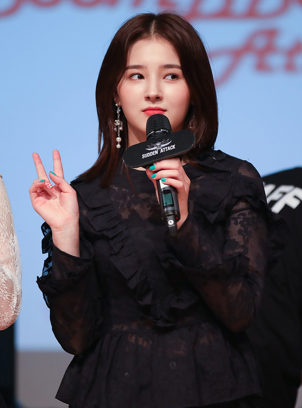 180506 모모랜드 서든어택 팬미팅